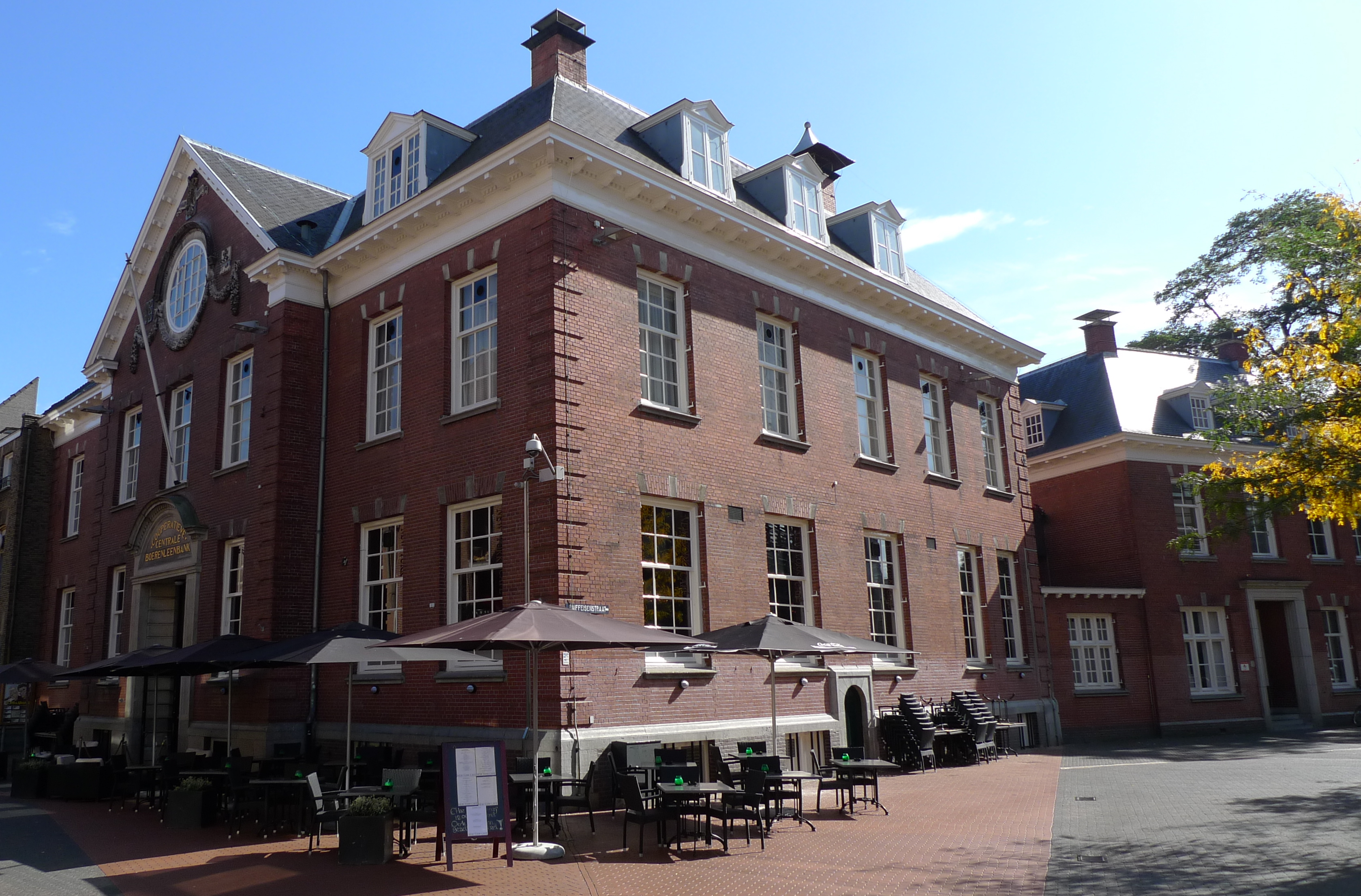 Boerenleenbank, Dommelstraat 9 in Eindhoven. Nederlands rijksmonument nr. 518714. Rechts zichtbaar: de bijbehorende directeurswoning, rijksmonument nr. 518715